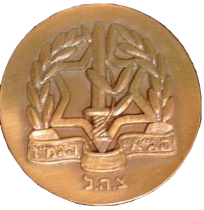 מדליה עם סמל מפקדת קצין חיל ראשי להג"א והגמ"ר.